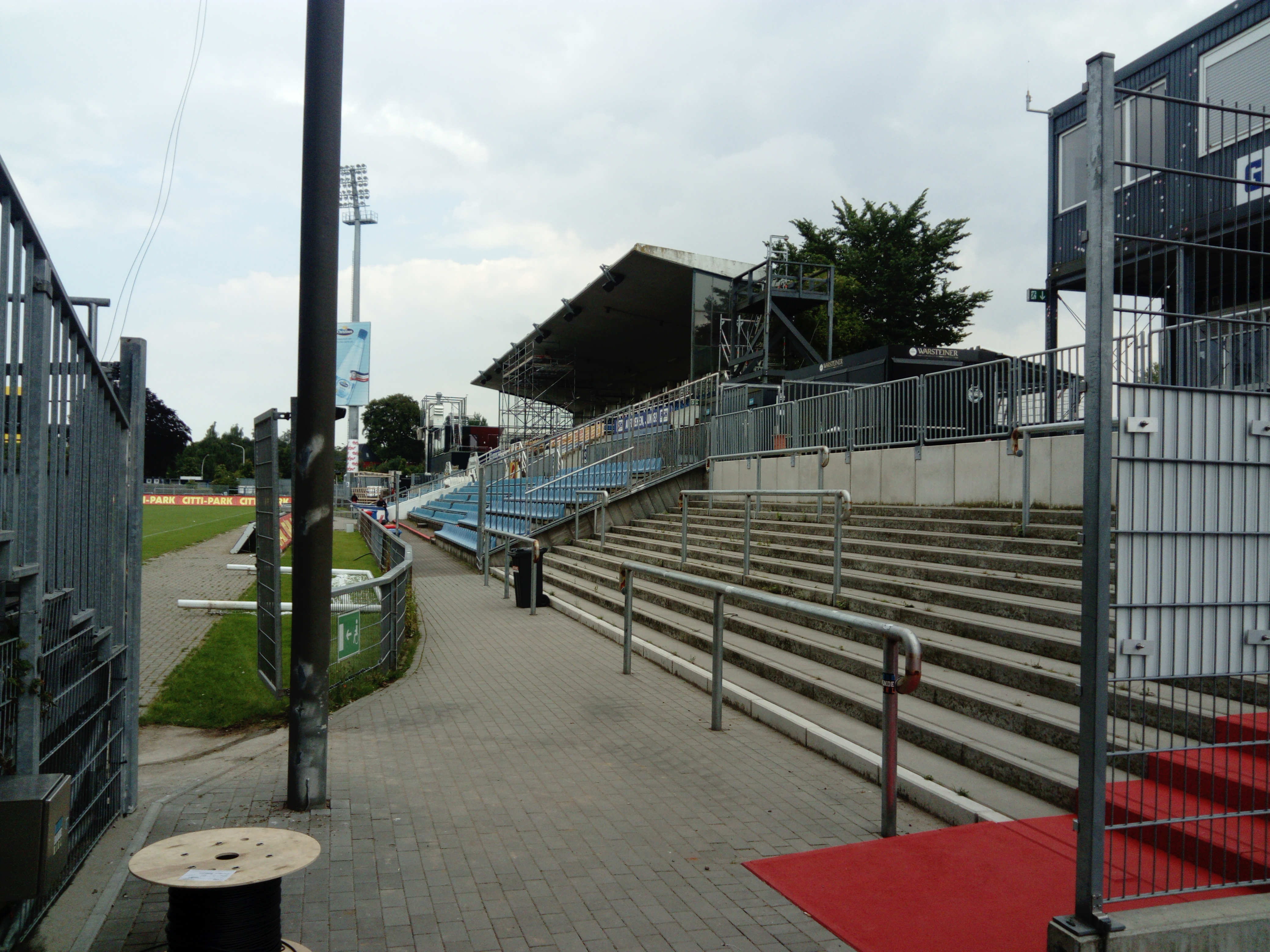 Holstein-Stadion Umbau Block G 2015. Neue Stufen und Wellenbrecher